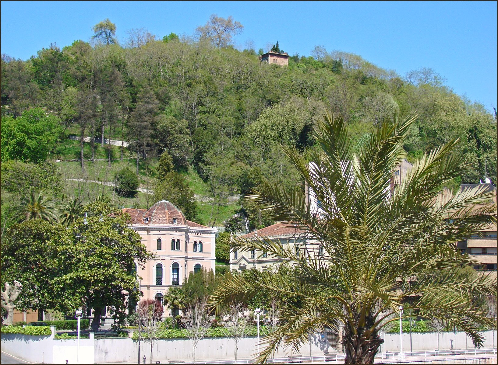 La rive droite de la Ria est l'ancienne zone résidentielle comprenant des jardins, de petits palais et des immeubles de la bourgeoisie de Bilbao.